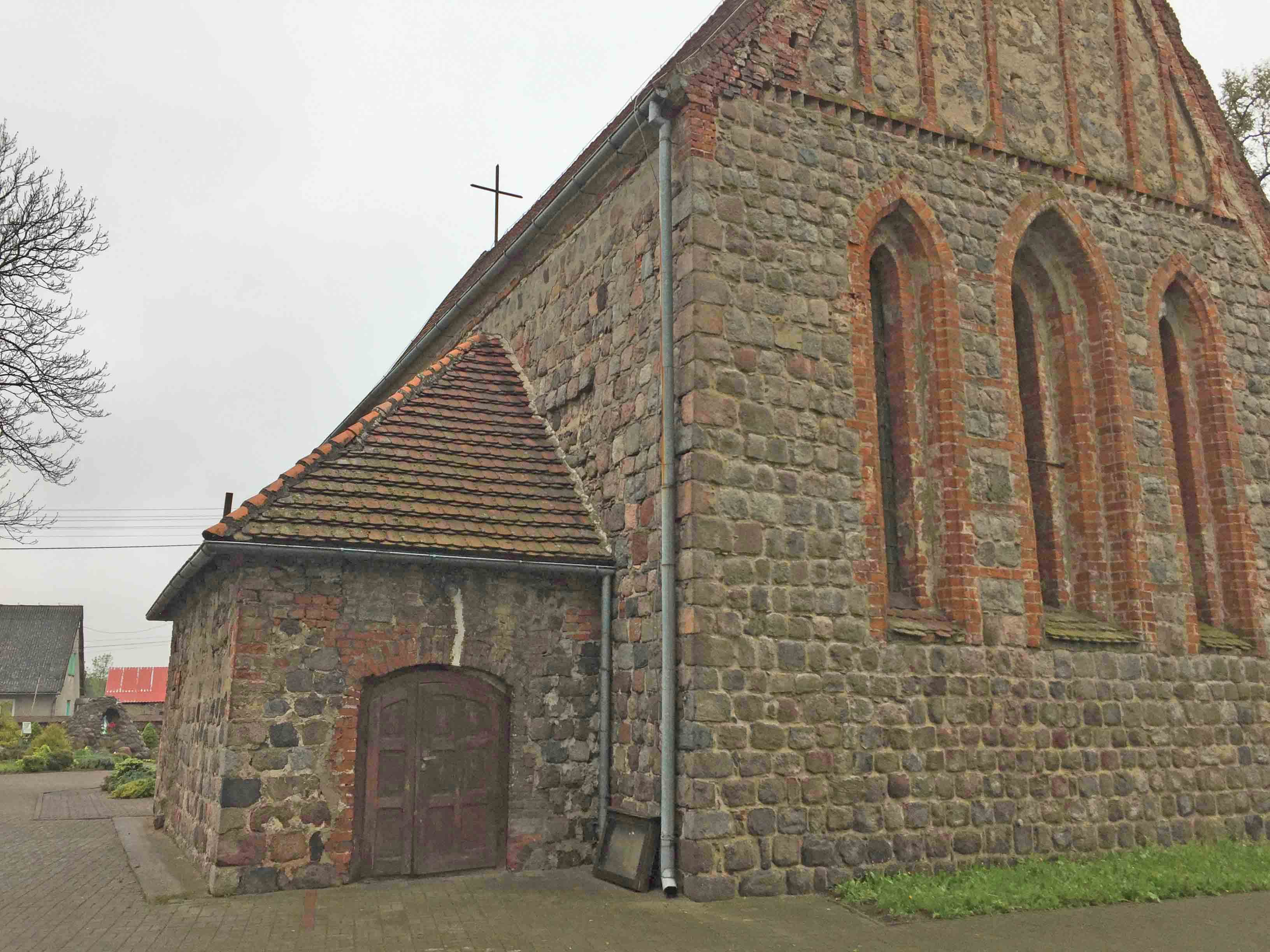 Skakbrætsten i 20. række (5,2 m oppe) på Marwice kirkes SØ-hjørne